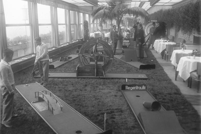 Der erste Miniatur-Golfplatz in Deutschland! Blick auf den ersten Miniatur-Golfplatz, welcher sich auf dem Dachgarten des Eden-Hotels in Berlin befindet.